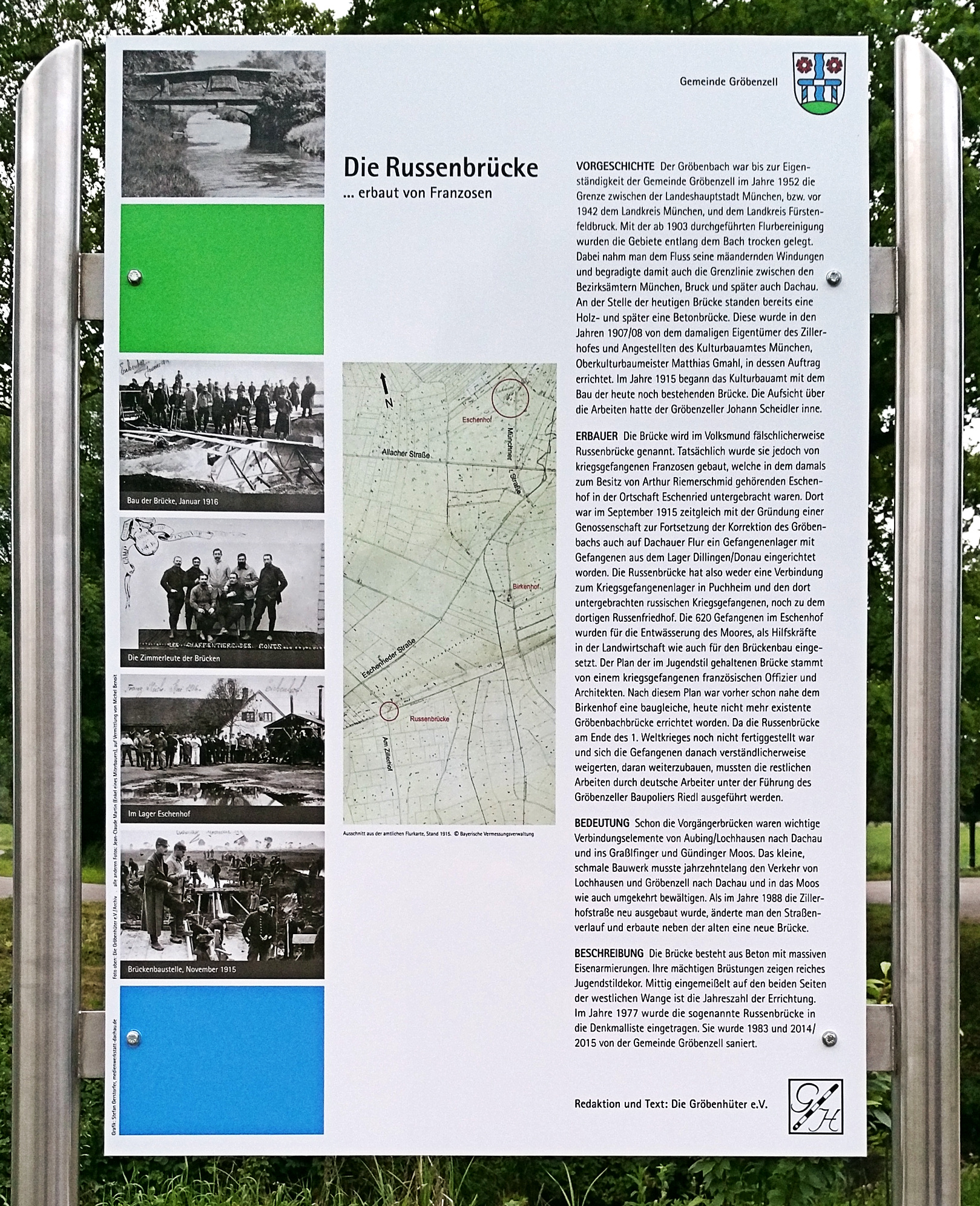 Deutschland, Bayern, Landkreis Fürstenfeldbruck, Gemeinde Gröbenzell, Infotafel an der Russenbrücke, enthüllt im Juni 2016